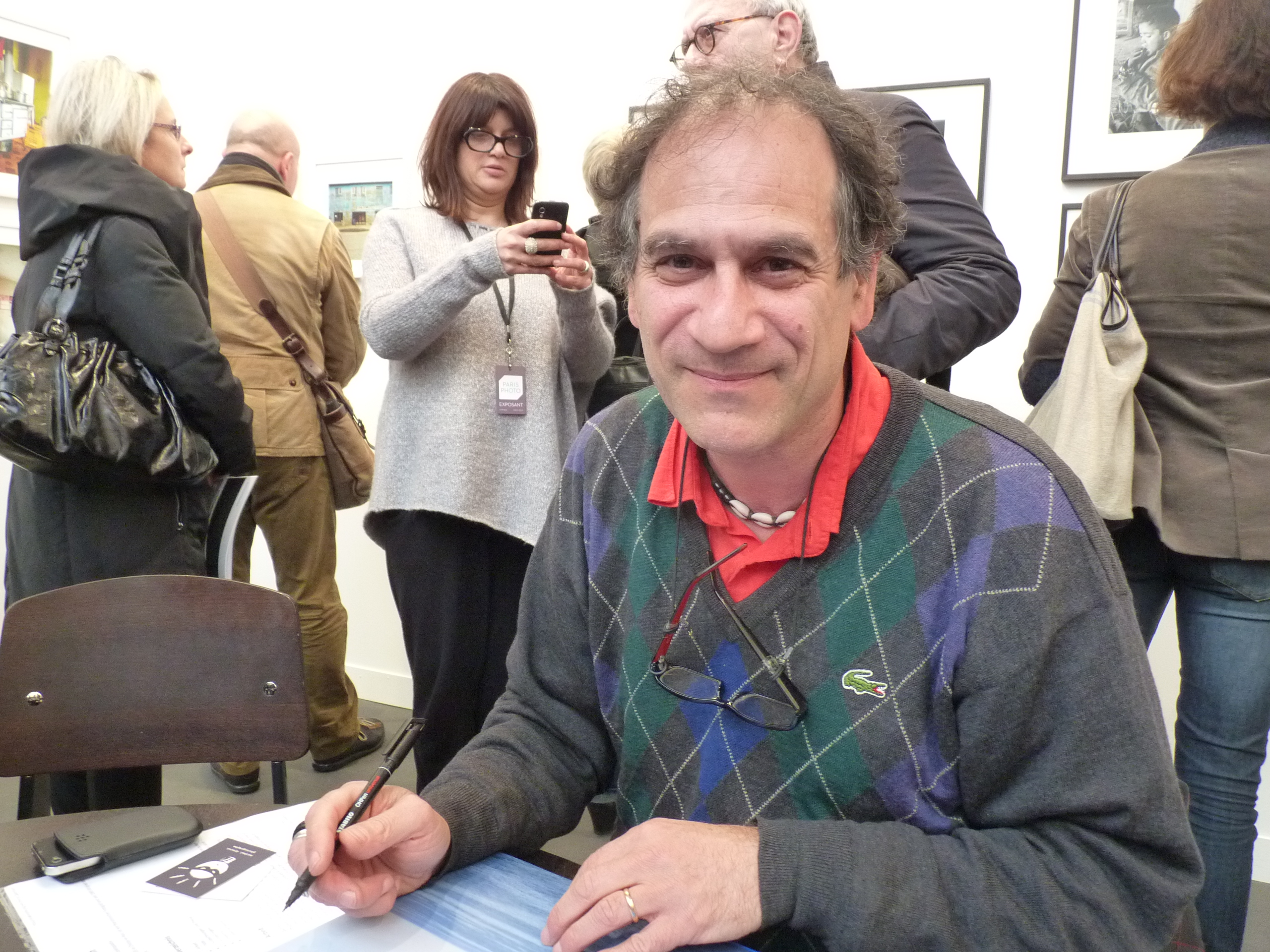 Signierstunde Paris 2013